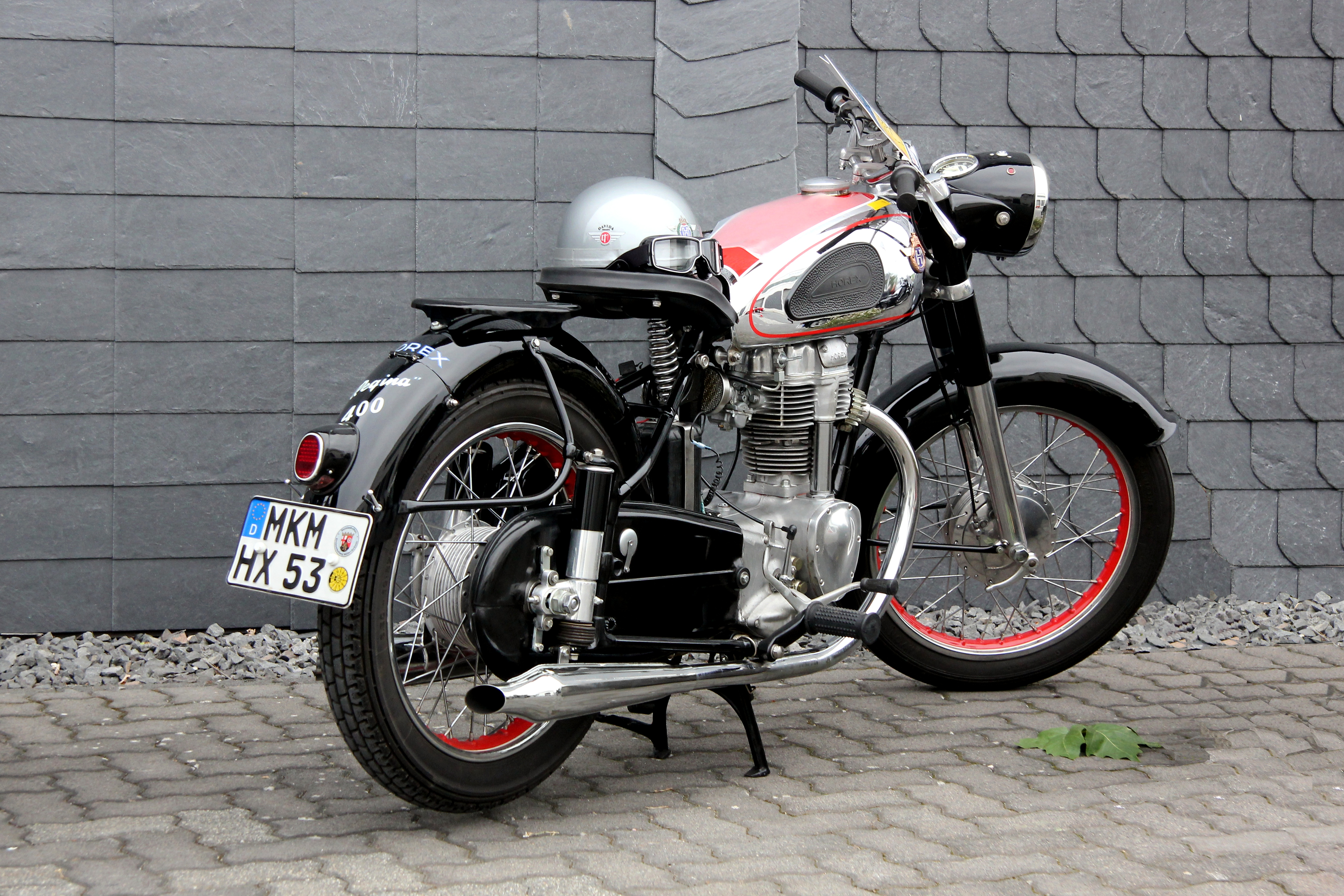 Horex Regina 400, 22 PS (Kennzeichen des Fahrzeugs verändert)